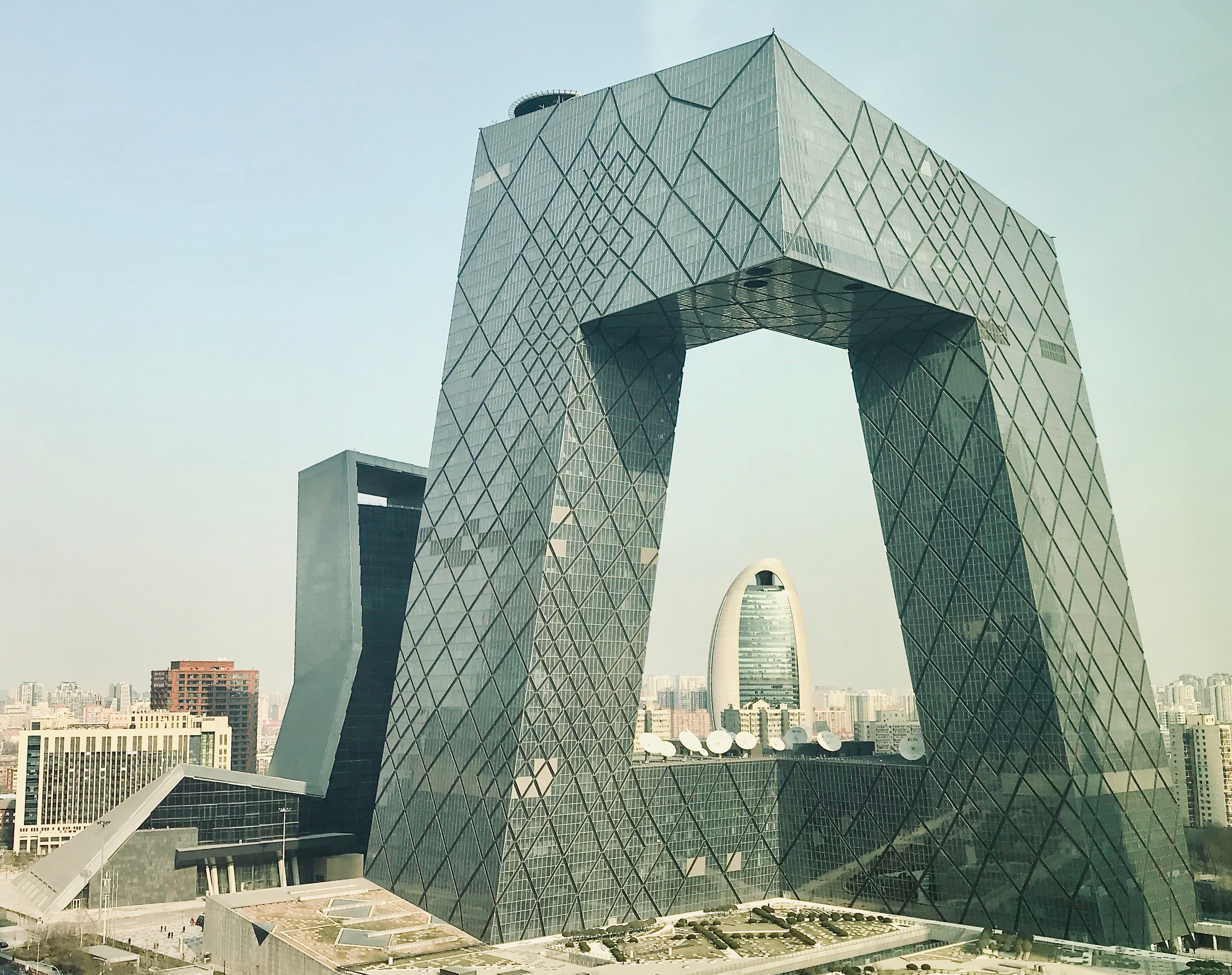 CCTVs huvudkontor (januari 2019)